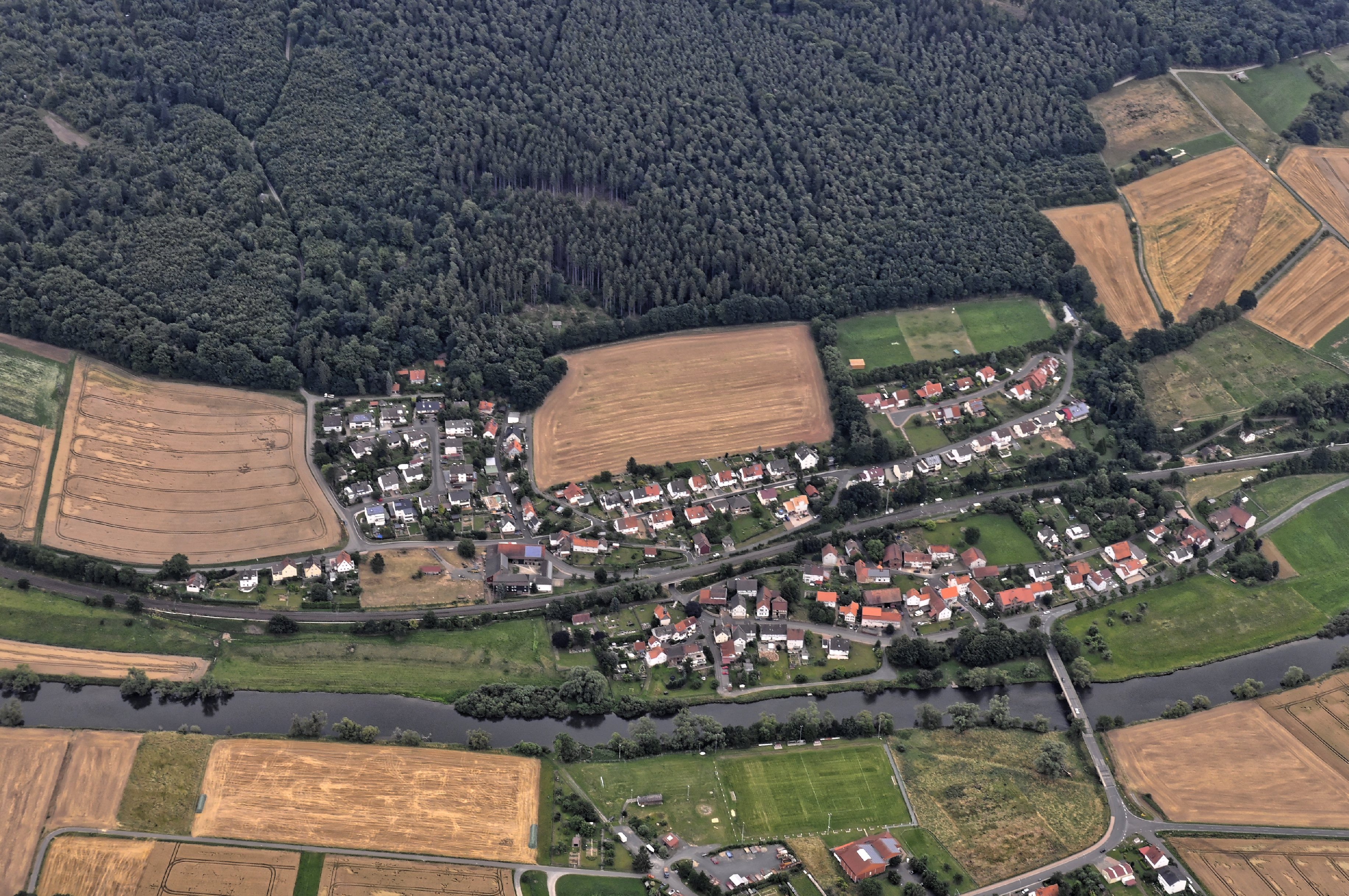 Bilder vom Flug Nordholz-Hammelburg 2015: Altenbrunslar, Stadtteil von Felsberg im nordhessischen Schwalm-Eder-Kreis.